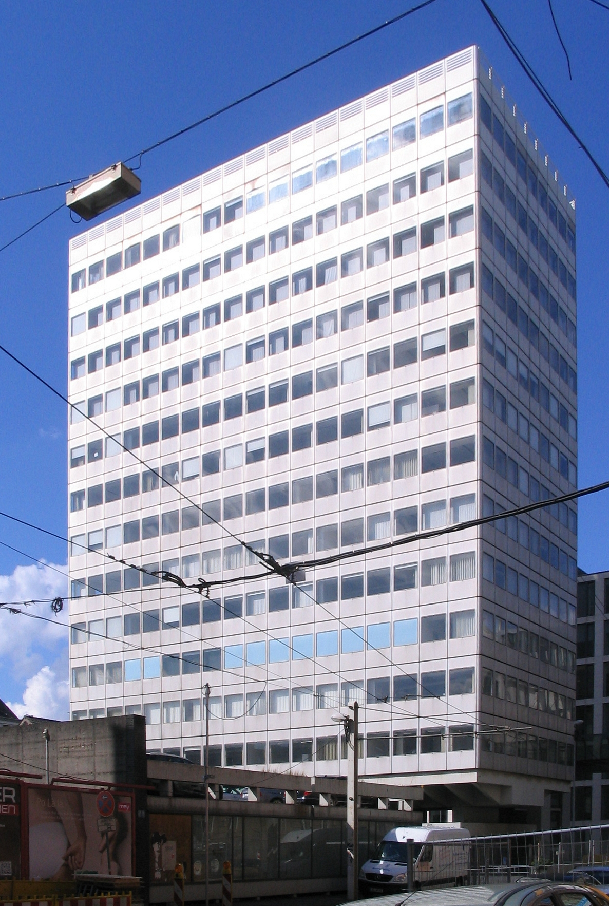 Düsseldorf, Kasernenstraße 39, Commerzbank-Hochhaus. Denkmalgeschütztes Bauwerk.